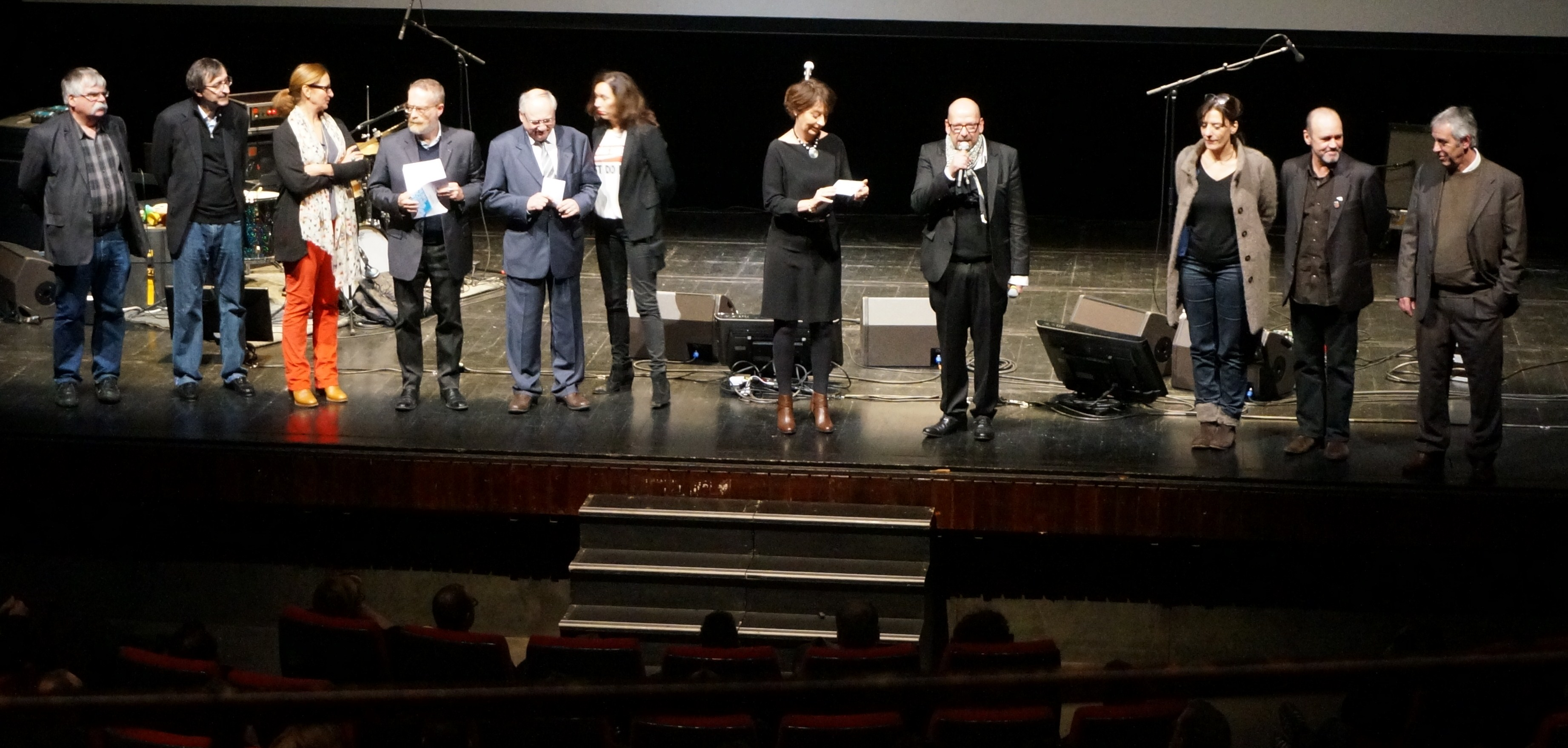 Lors de la présentation de la manifestaiton à la Comédie. Sur scène : Adeline Hazan Jean Paul Olivier Stéphanie Aubin Gérald Chabaud Florence Derieux Serge Gaymard Ludovic Lagarde Philippe Lefort Joel Simon .